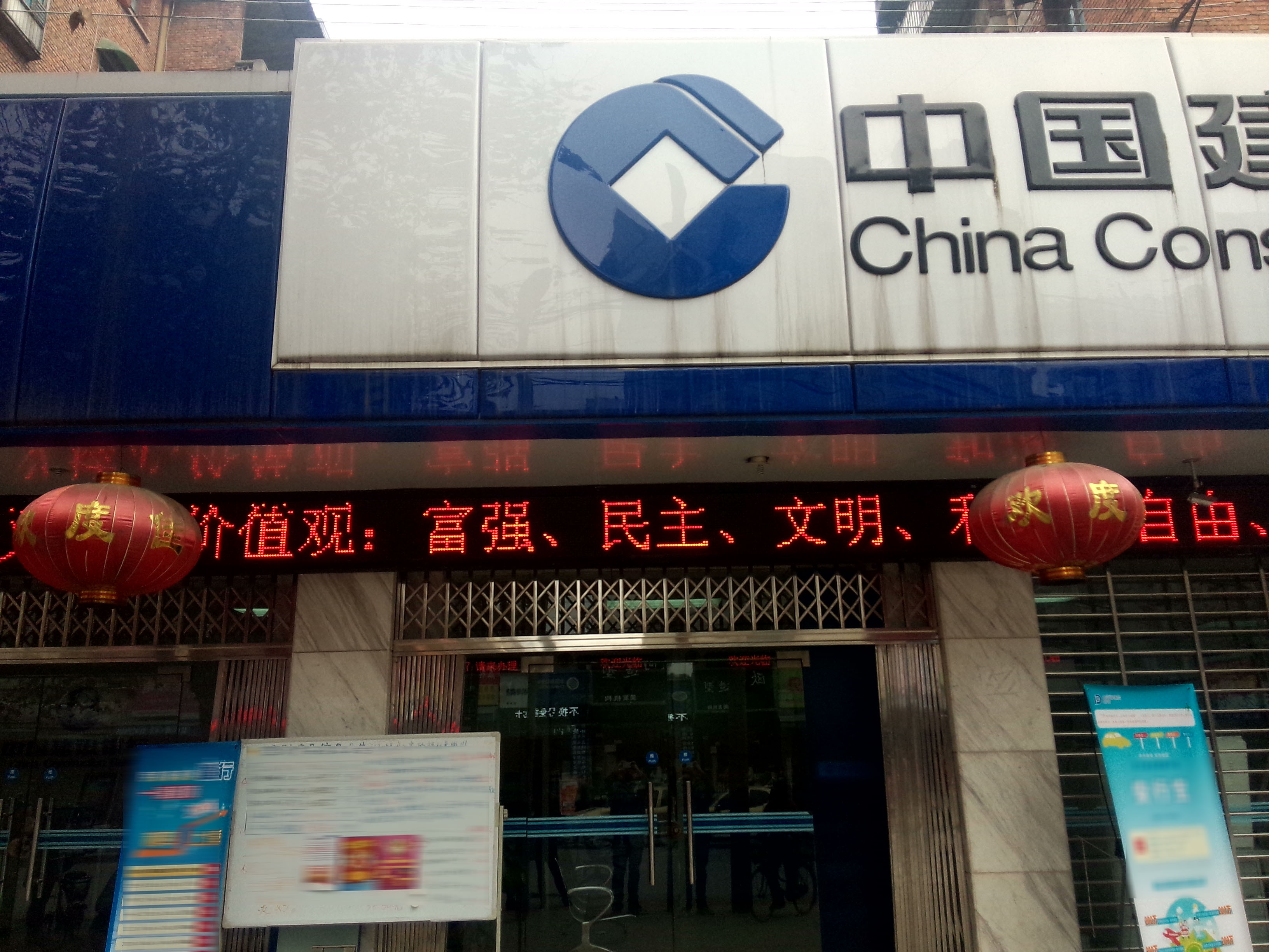 社会主义核心价值观在一家银行的电子显示屏上展示